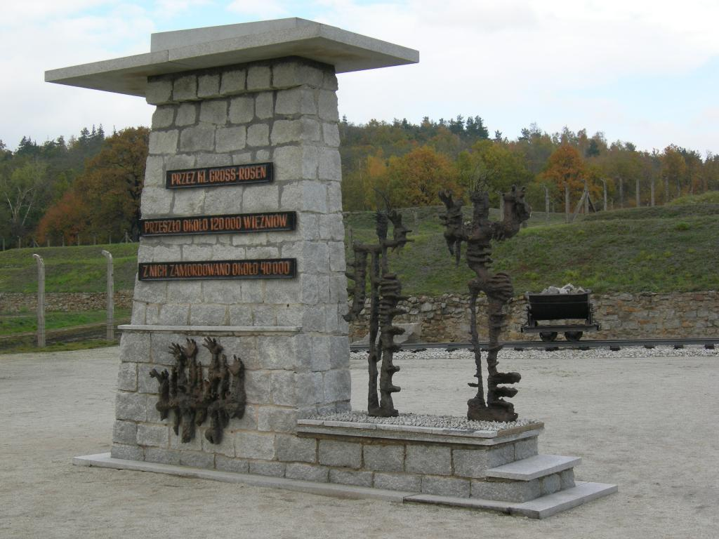 Monument à l'entrée du camp de Gross-Rosen